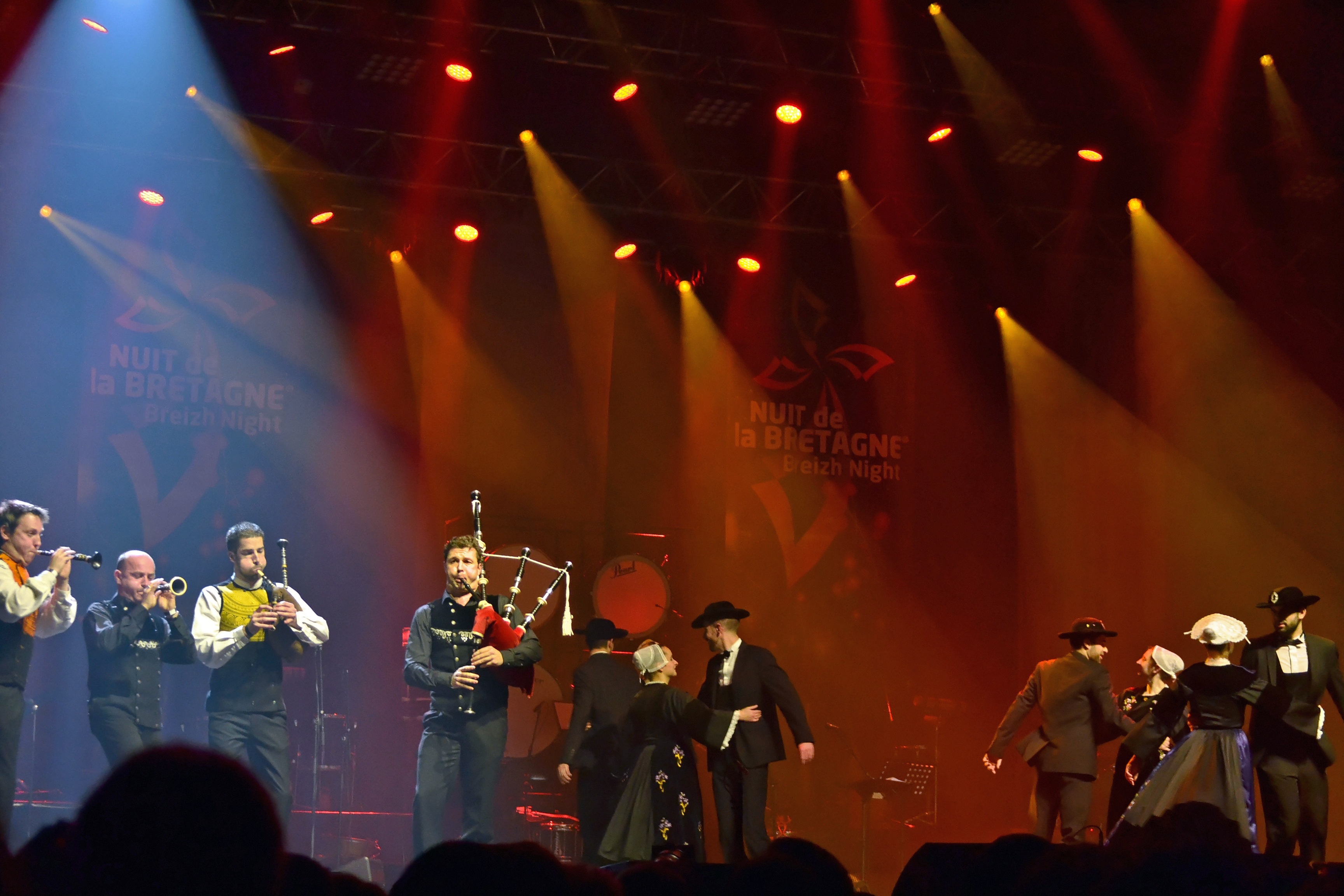 Les meilleurs sonneurs et danseurs des concours de 2015 en Bretagne pour la Nuit de la Bretagne au parc de Langolvas à Morlaix le 22 janvier 2016.